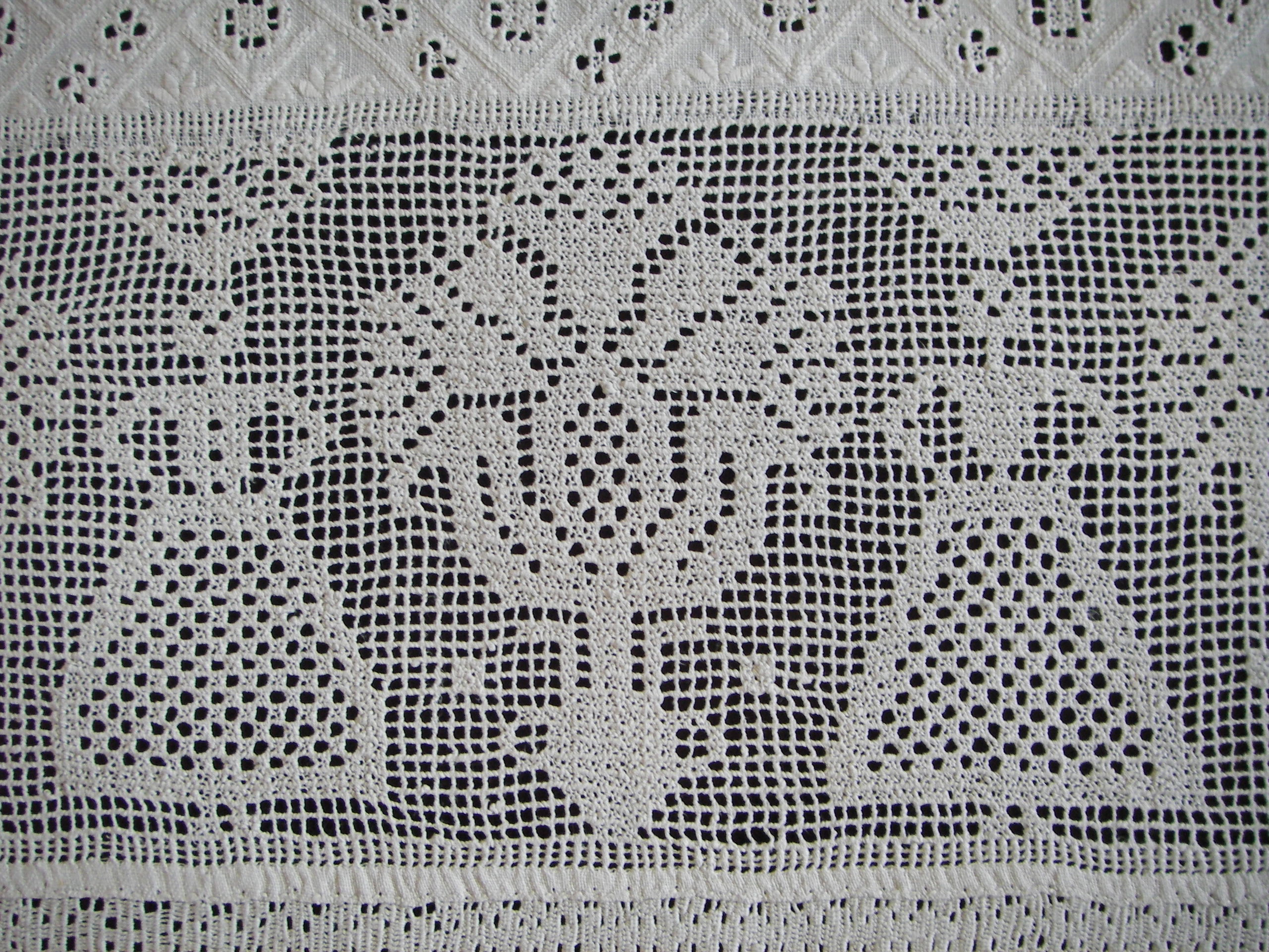 Hedebosyning fra perioden ca. 1750 - 1840